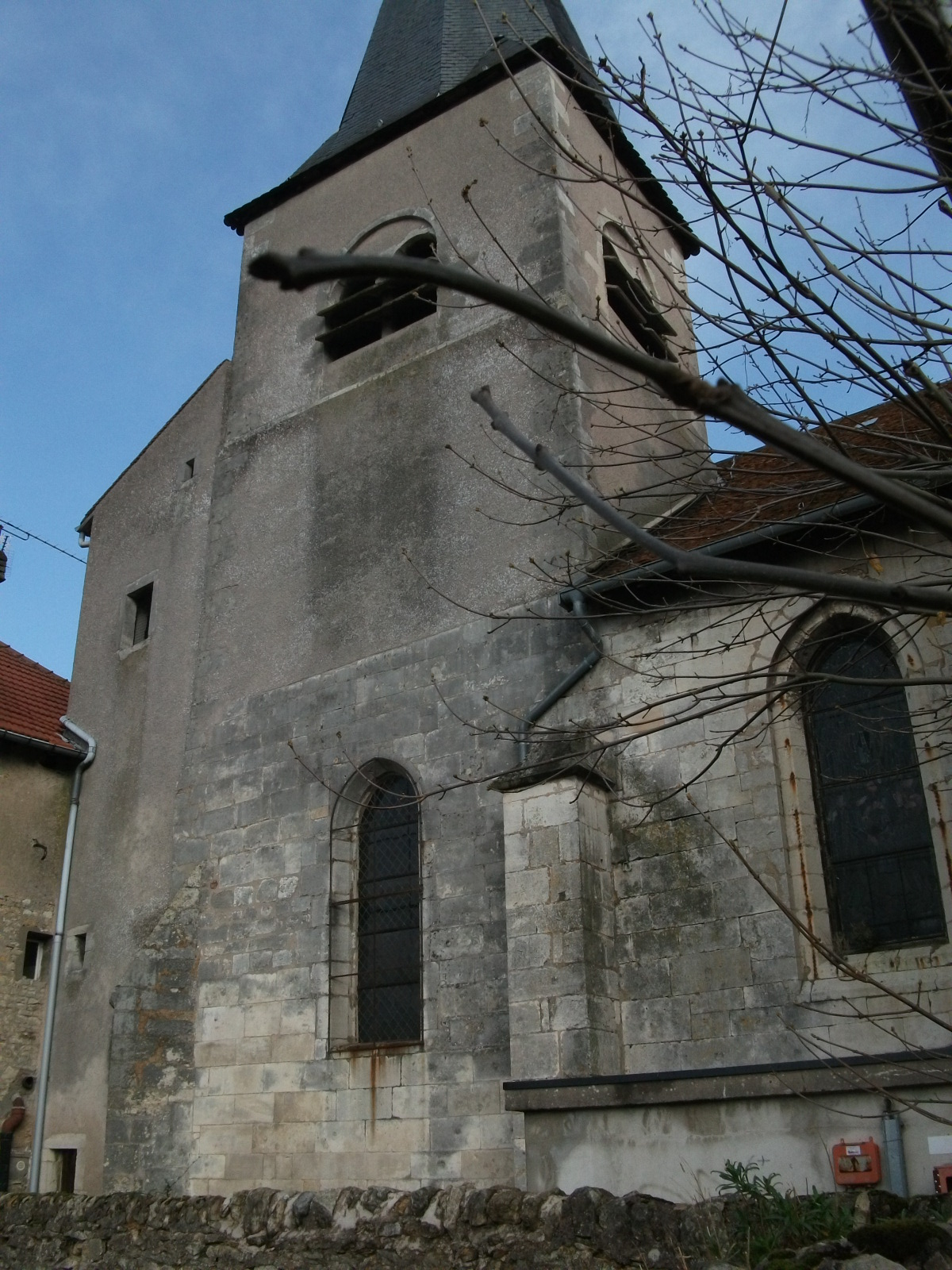 extérieurs de l'église.